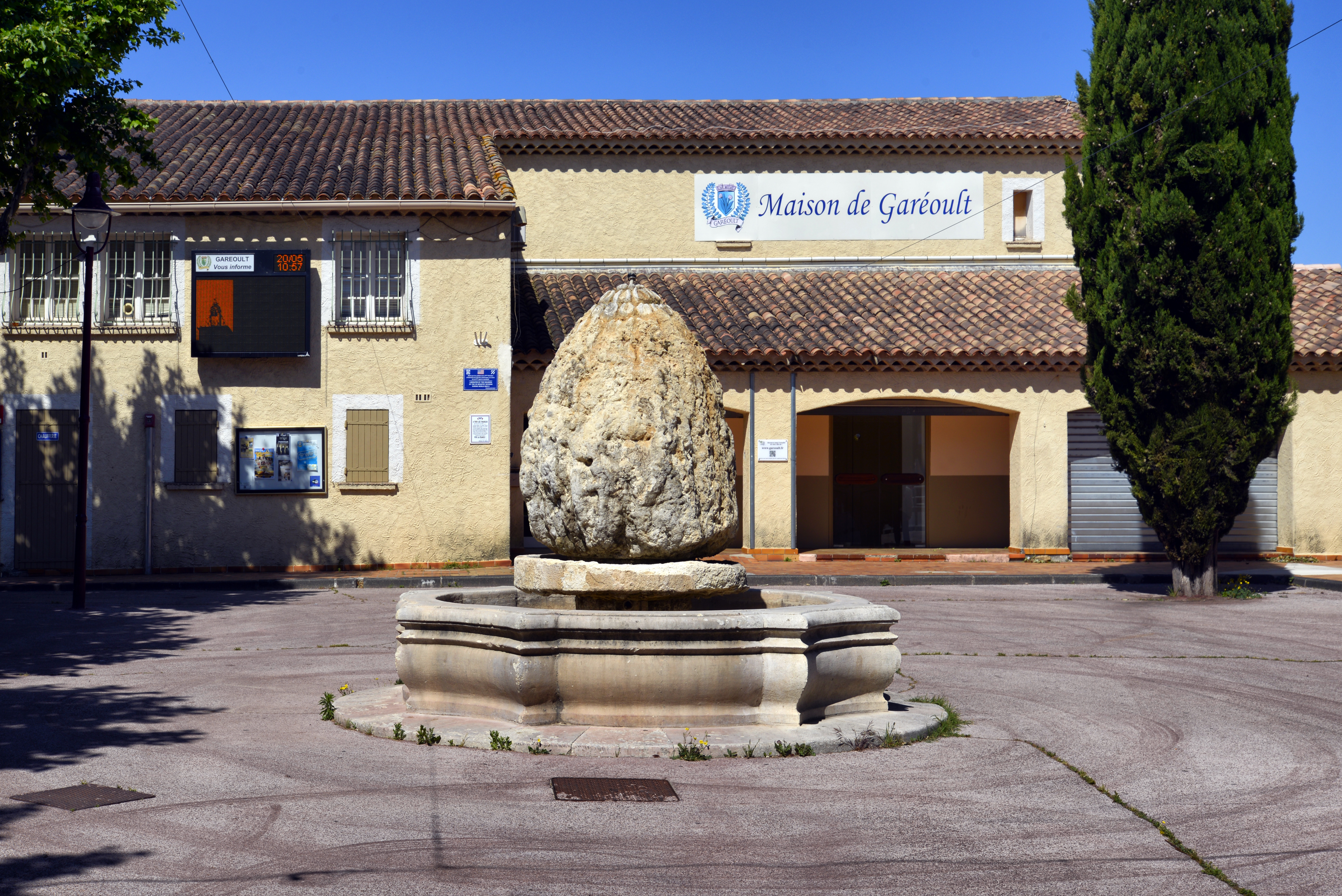 Garéoult, Var (Provence) - Maison de Garéoult et la fontaine